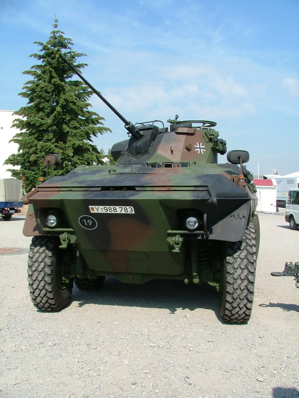 Der Spähpanzer 2 (SpPz 2) Luchs beim Hessentag 2004 in Heppenheim.